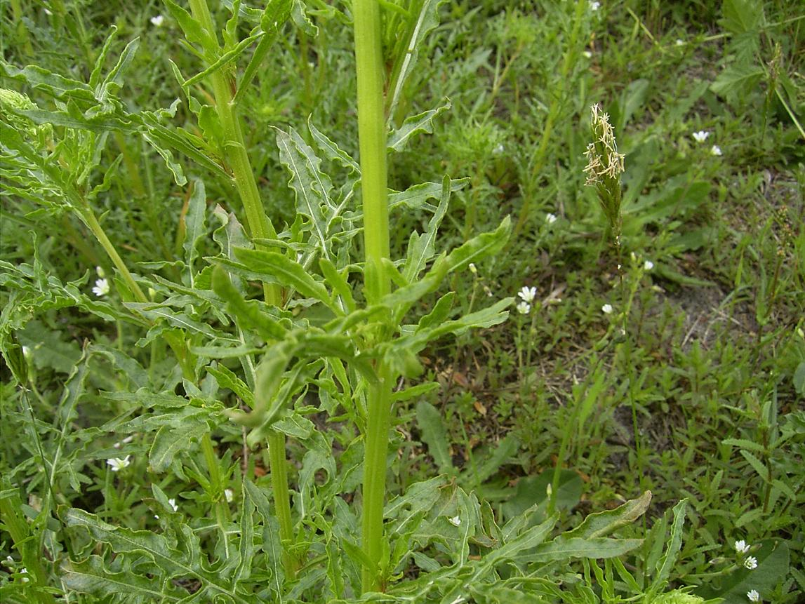 Reseda lutea Gouda, bedrijventerrein GoudsePoort, mei 2004